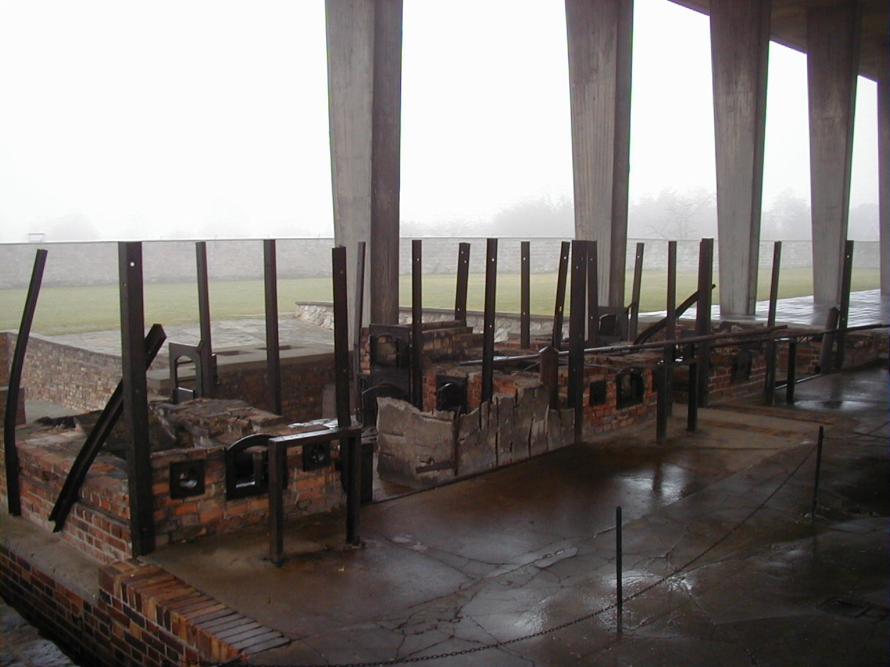 Öfen in Sachsenhausen